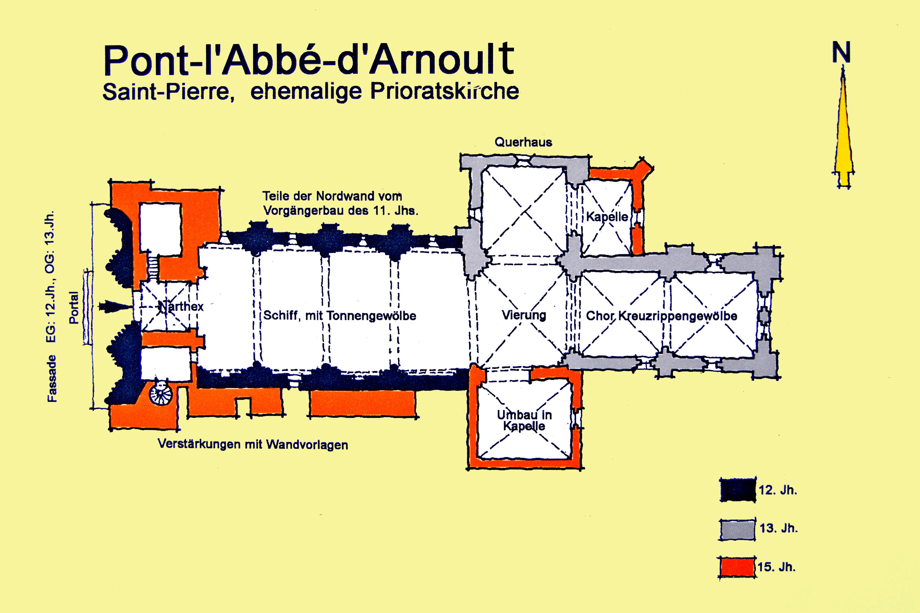 St-Pierre de Pont-l’Abbé-d’Arnoult (17), Grundriss, Hanmdskizze